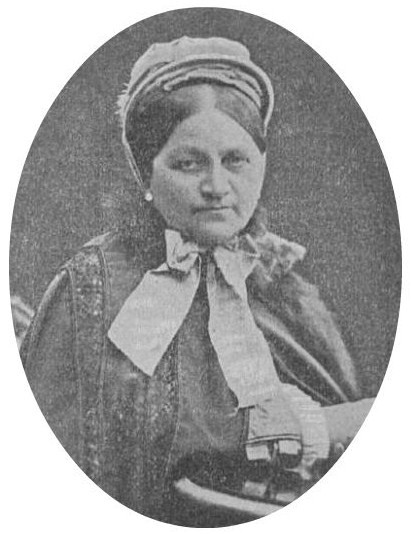 Княгиня Софья Владимировна Масальская, урождённая Мезенцова (1825—1914)